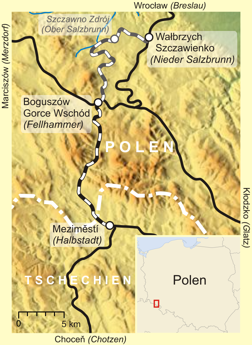 Verlaufskarte der Bahnstrecke Wałbrzych–Meziměstí